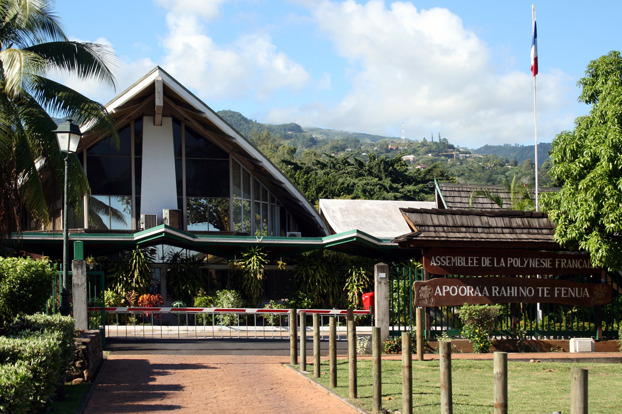 Assemblee de la Polynesie Francaise à Papeete